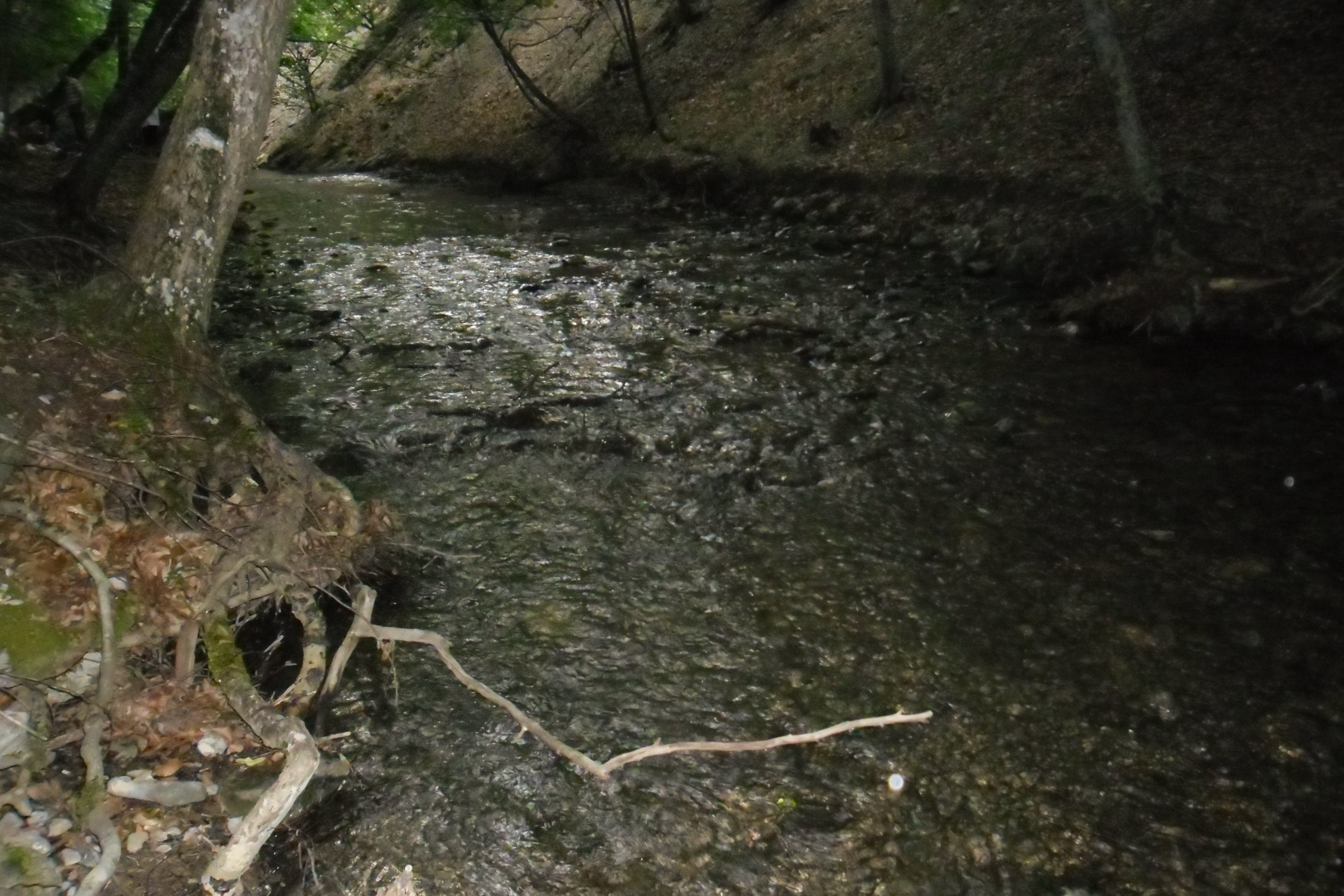 Фото